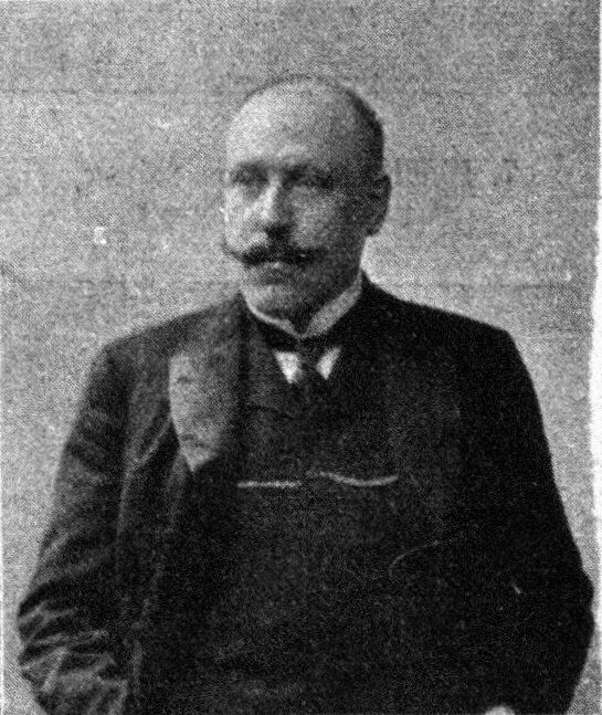 Österreichischer Politiker, Reichsratswahl 1907, Name siehe Dateiname